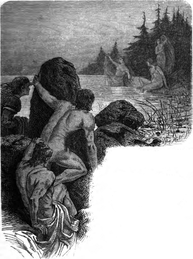 Captioned as "Die drei Schmiedeburschen belauschen und gewinnen drei Walkürenjungfrauen". The three smith boys spy and win three valkyrie maidens.